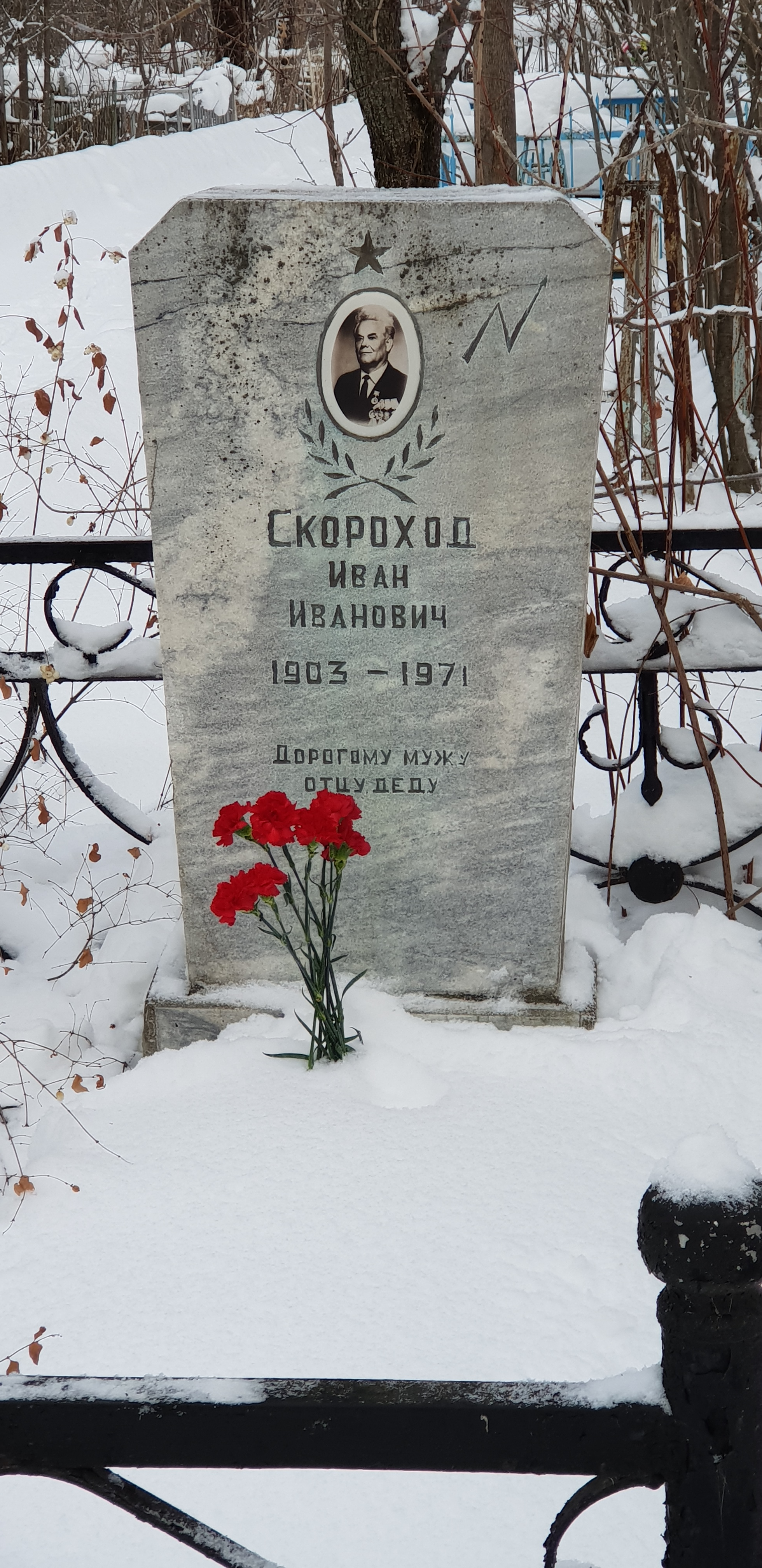 Памятник на могиле Скорохода Ивана Ивановича, Сергиевское кладбище города Уфы